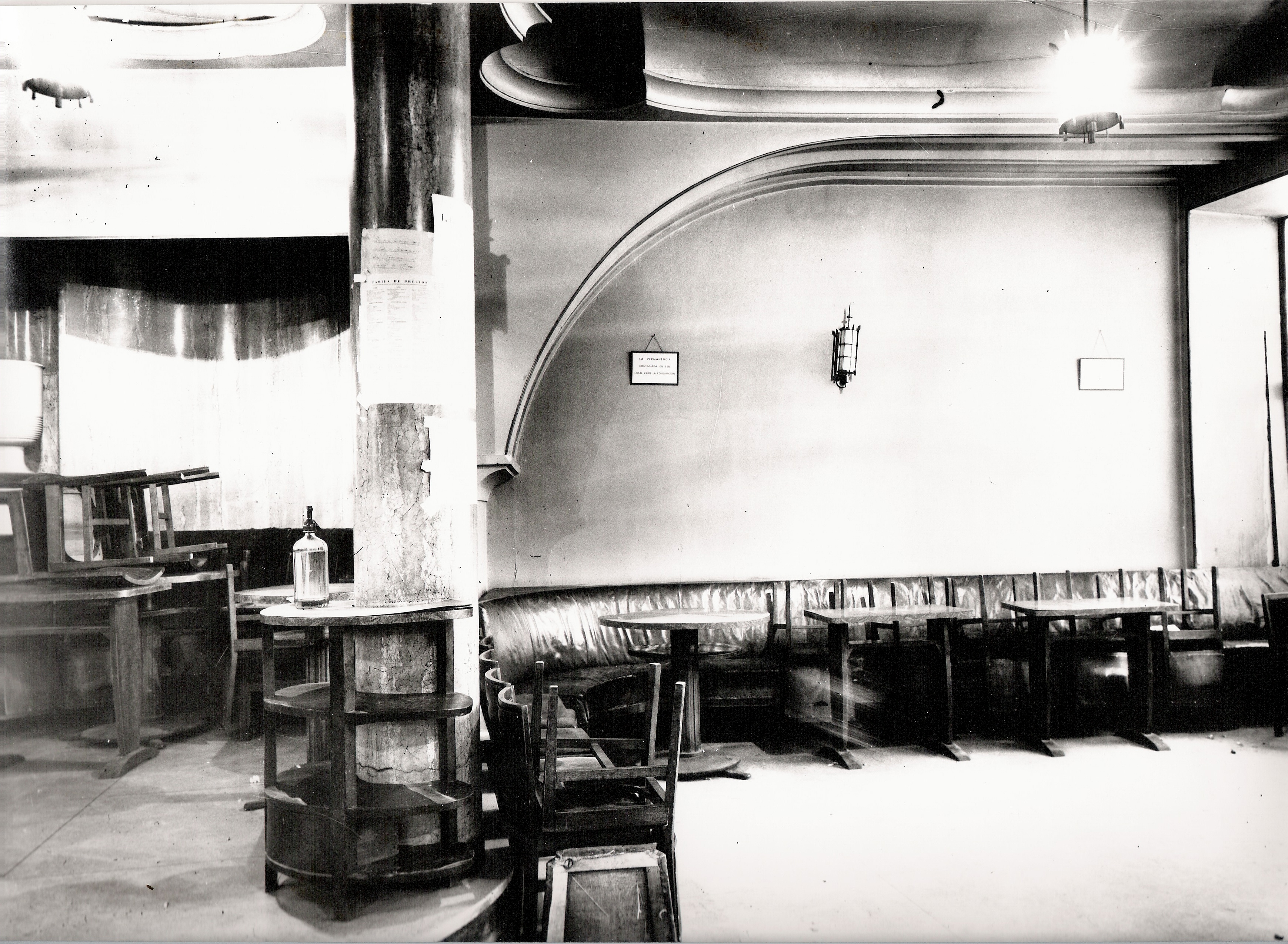 Instantánea del Café Novelty, de Salamanca.